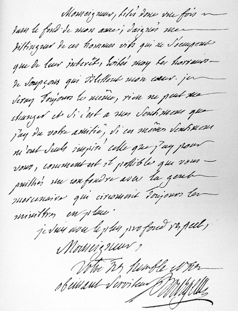 Autographe de Claude Bourgelat (1712–1779), Fin d'une lettre adressé à Henri-Léonard-Jean-Baptiste Bertin (1719–1792) le 22 juillet 1771, dans laquelle Bourgelat se défend d'avoir cherché à obtenir le privilège des fiacres de Paris